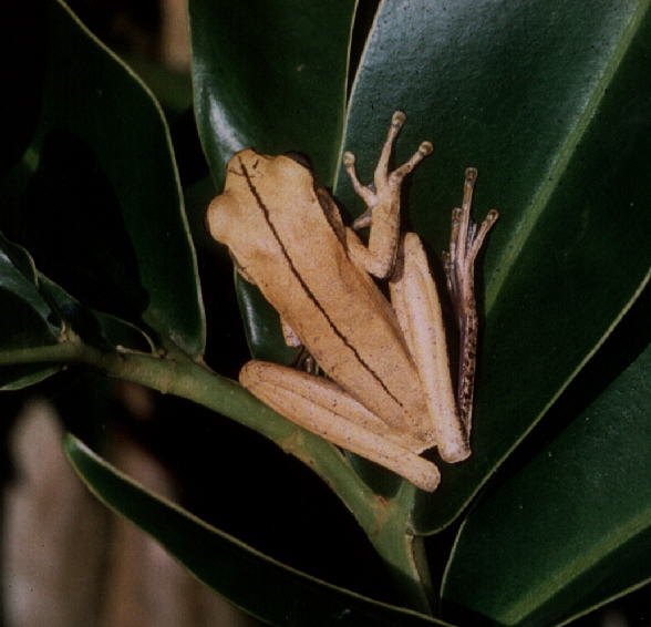 Hypsiboas multifasciatus